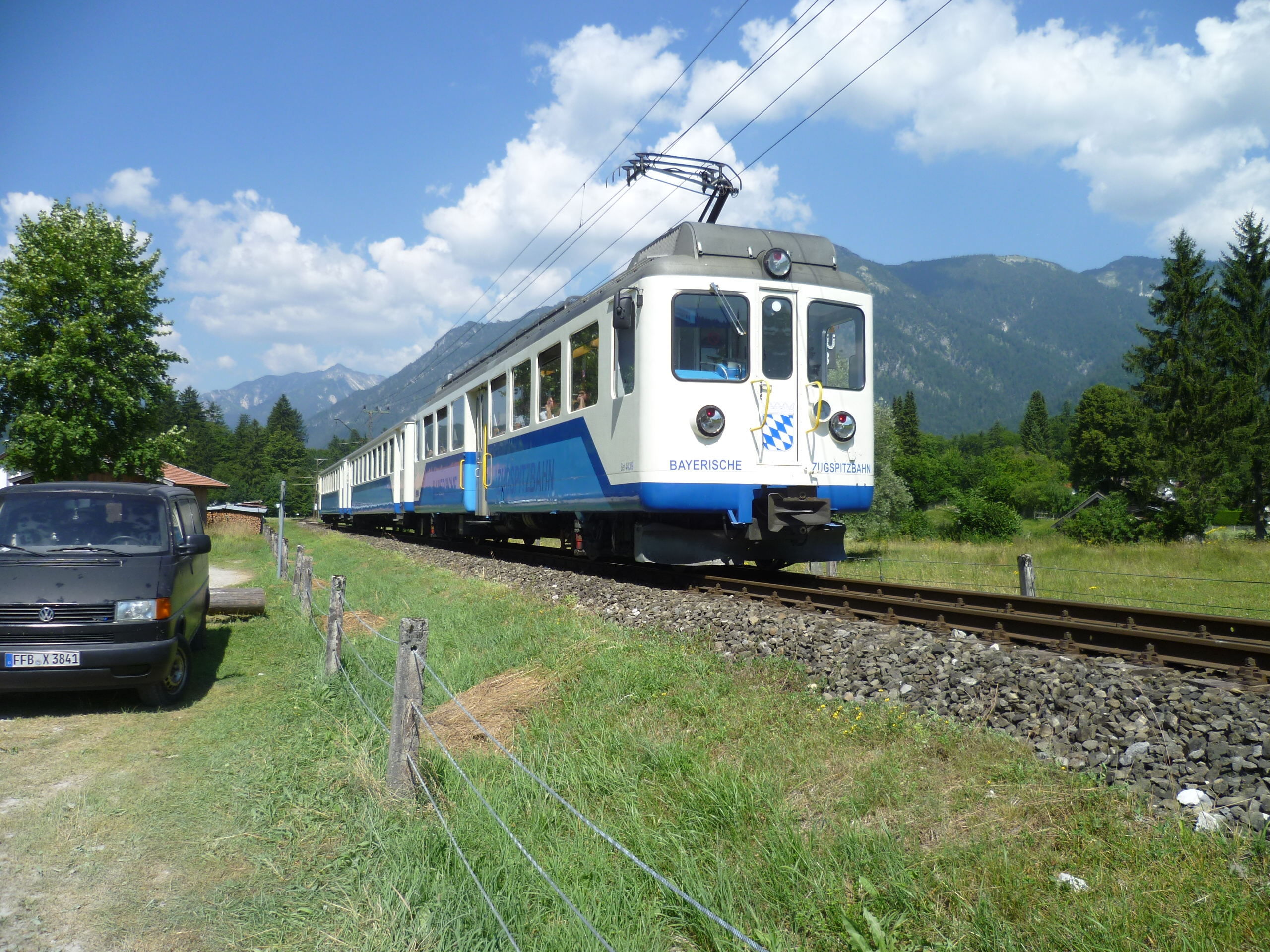 Triebwagen 309 (ex Berner Oberland Bahn) schiebt einen Zug mit zwei Steuerwagen (ex Regionalverkehr Bern–Solothurn) von Garmisch Richtung Eibsee; kurz hinter der Station Hammersbach